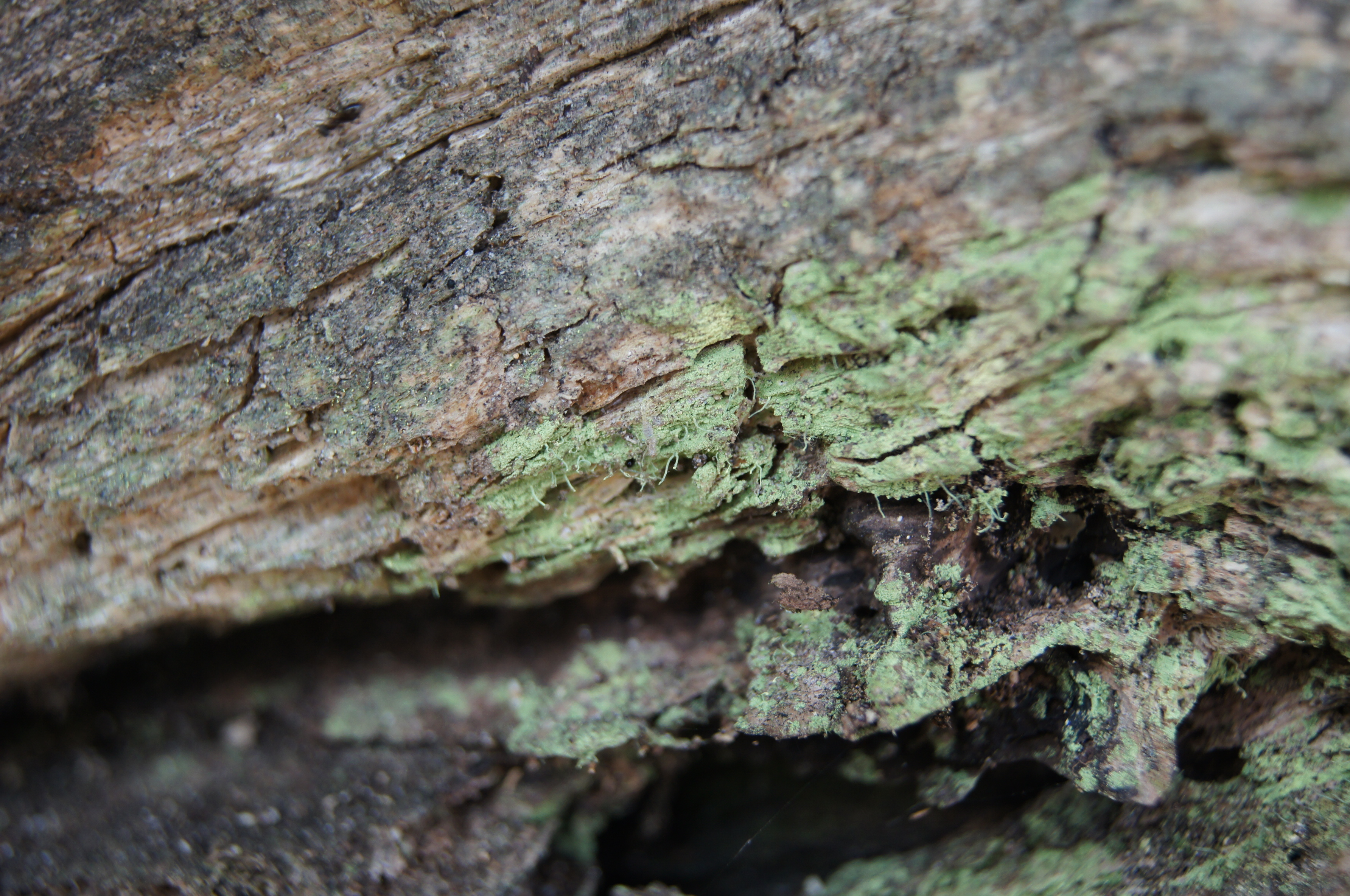 Žalsvoji žiovenė (Chaenotheca chlorella)